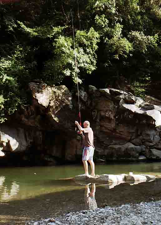 Pesca alla passata in Toscana